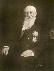 Бычков, Афанасий Фёдорович